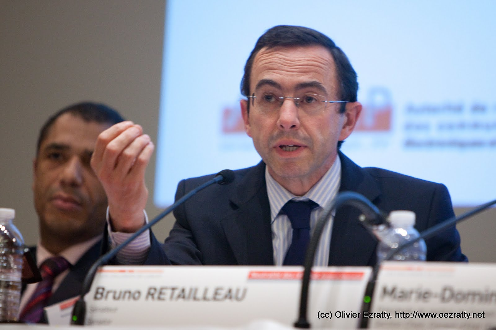 Bruno Retailleau lors du colloque ARCEP Neutralité des Réseaux